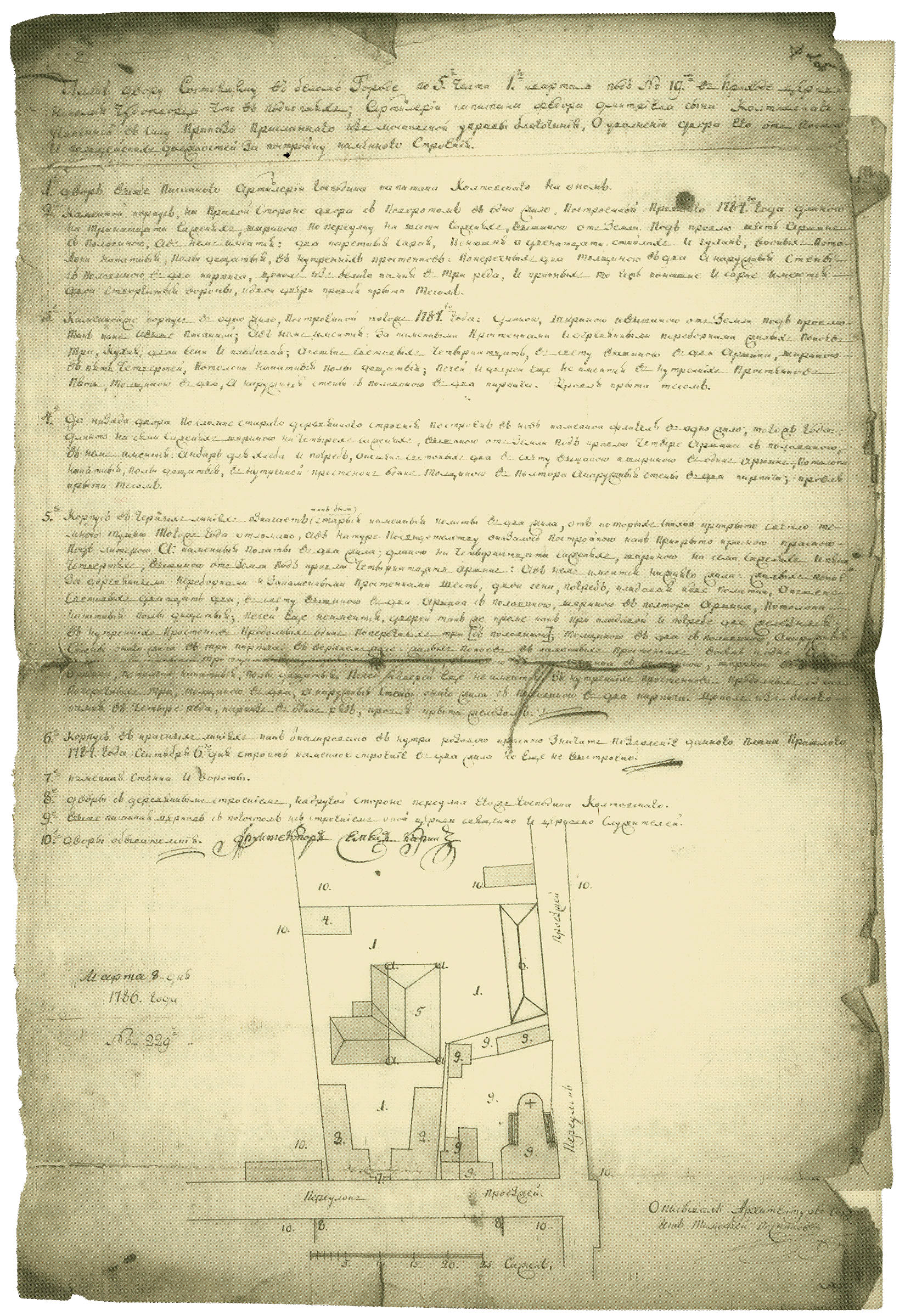 План владения артиллерии капитана Ф. Д. Колтовского и земельного участка церкви святителя Николая в Подкопаях. 1786. ЦИАМ. План двору, состоящем в Белом городе по 5 части 1-го квартала под № 19-м в приходе церкви Николая Чудотворца, что в Подкопаях, артиллерии капитана Федора Дмитрия сына Колтовского, учиненный в силу приказа, присланного из Московской Управы благочиния, о увольнении двора его от тяготы и полицейских должностей за постройку каменного строения 1. Двор ... артиллерии господина капитана Колтовского, на оном: 2. каменный корпус ... в одно жило, построенный прошлого 1784-го г., в нем имеется: два каретных сарая, конюшня о 12 стойлах и чулан; 3. каменный же корпус в одно жило, построенный того же 1784-го г., а в нем имеется:... жилых покоев три, кухня, две сени и кладовка; 4. да назади двора по сломке старого деревянного строения построен вновь каменный флигель в одно жило, того же года, а в нем имеется: амбар хлеба и погреб; 5. корпус в черных линиях означает как были старая каменная палата в два жила, от которых сколько прикрыто тушью того же года , а в натуре ... оказалось постройкою как прикрыто красным под лит. А каменная палата в два жила... а в нем имеется нижнего жила; покоев жилых шесть, двое сени, погреб, кладовая и две по латки... в верхнем жиле: жилых покоев ... восемь и одне сени; 6. ...(означает) позволения данного плана прошлого 1784 г. ...строить каменное строение в два жила, но еще не выстроено; 7. каменная стенка и вороты; 8. дворы с деревянным строением, на другой стороне переулка его же Колтовского; 9. вышеписанная церковь с погостом и строениями оной церкви ... церковнослужителей; 10. дворы обывателей Архитектор Семен Карин